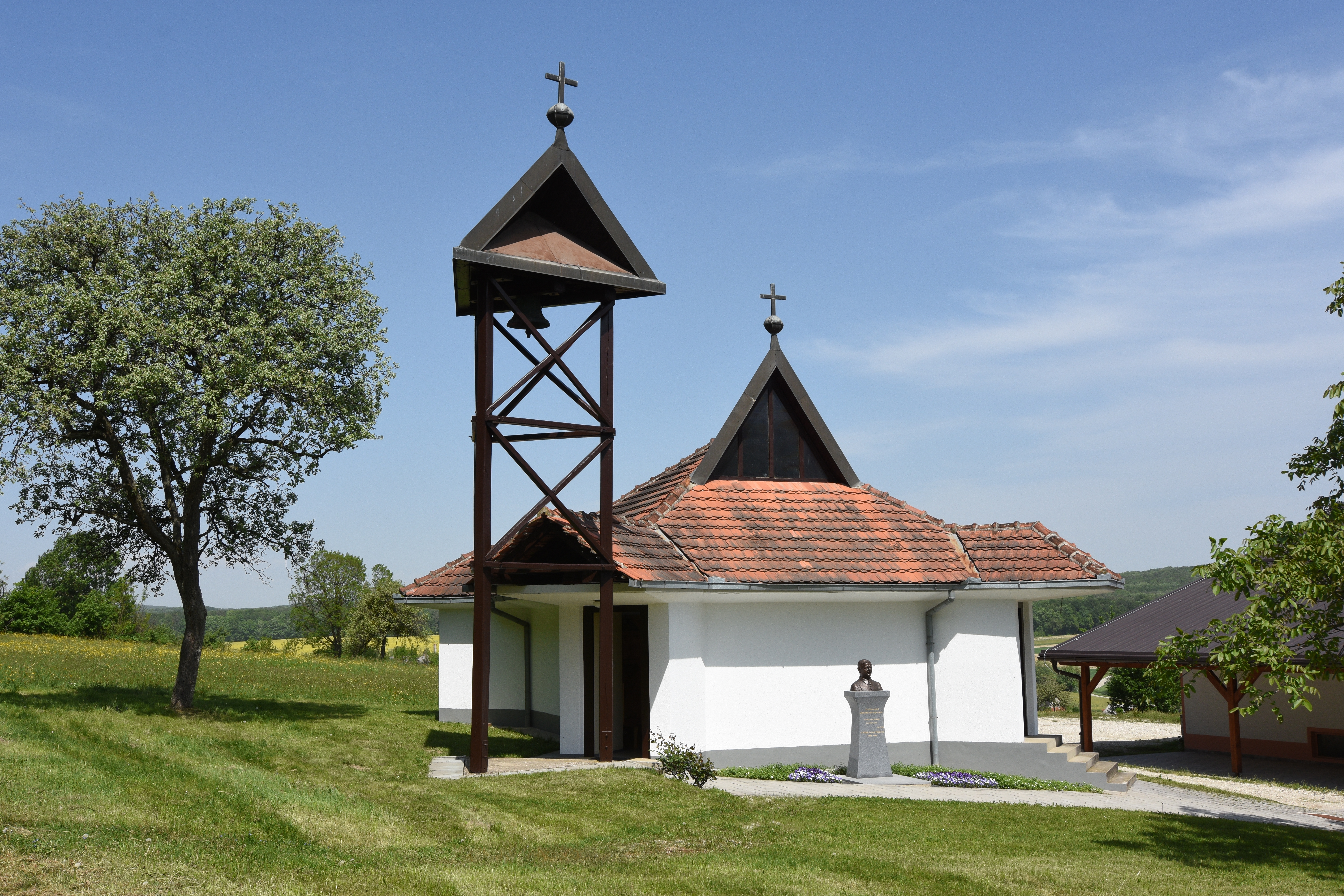 Kapela Prosenjakovci